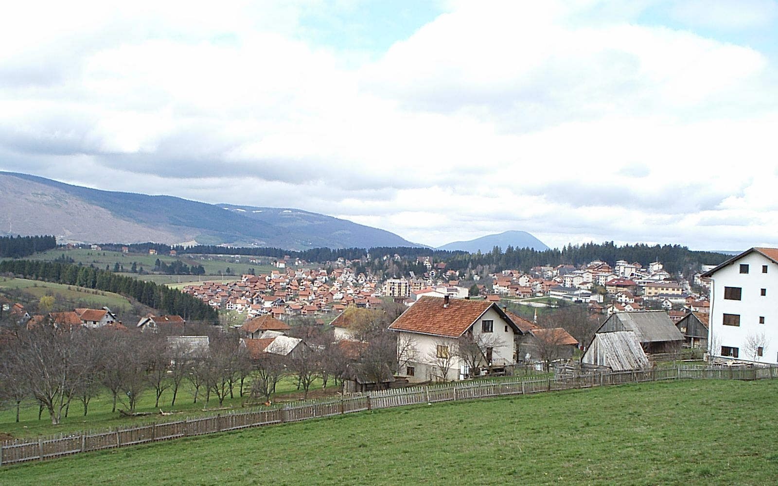 Panorama Kneževa